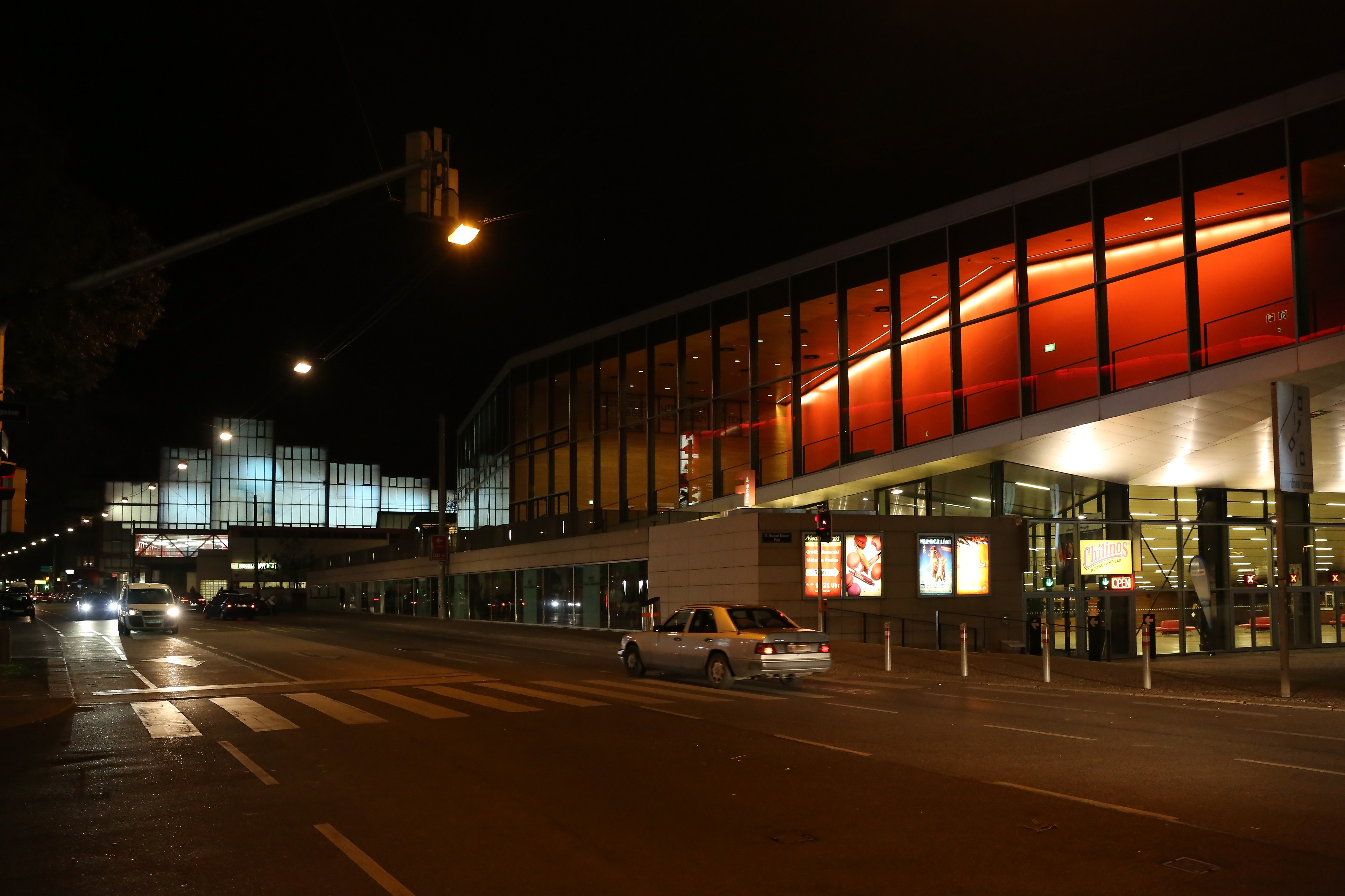 Halle F, dahinter das Stadthallenbad, der Wiener Stadthalle am Abend der Verleihung des Nestroy-Theaterpreises 2013 (Wien, Österreich).